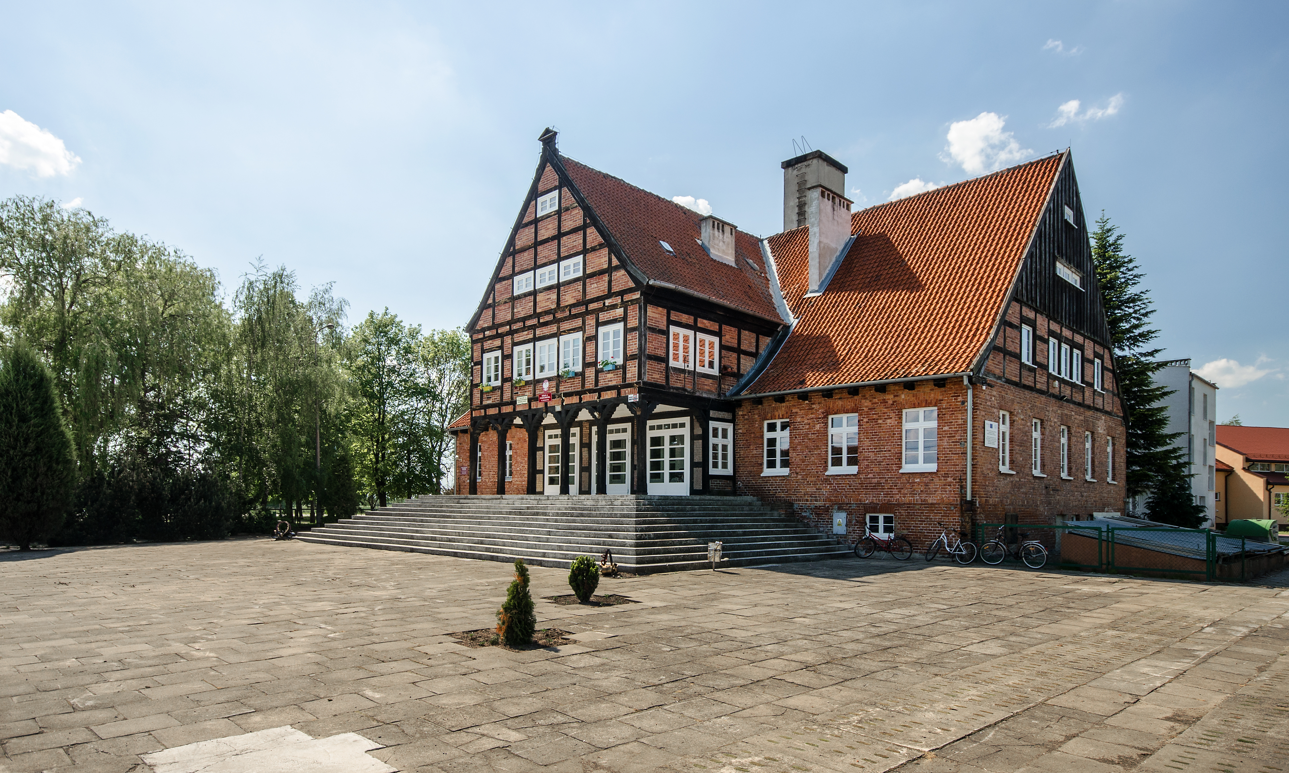 Zwierzno 28 - budynek tzw. "Dom Ludowy", ob. szkoła